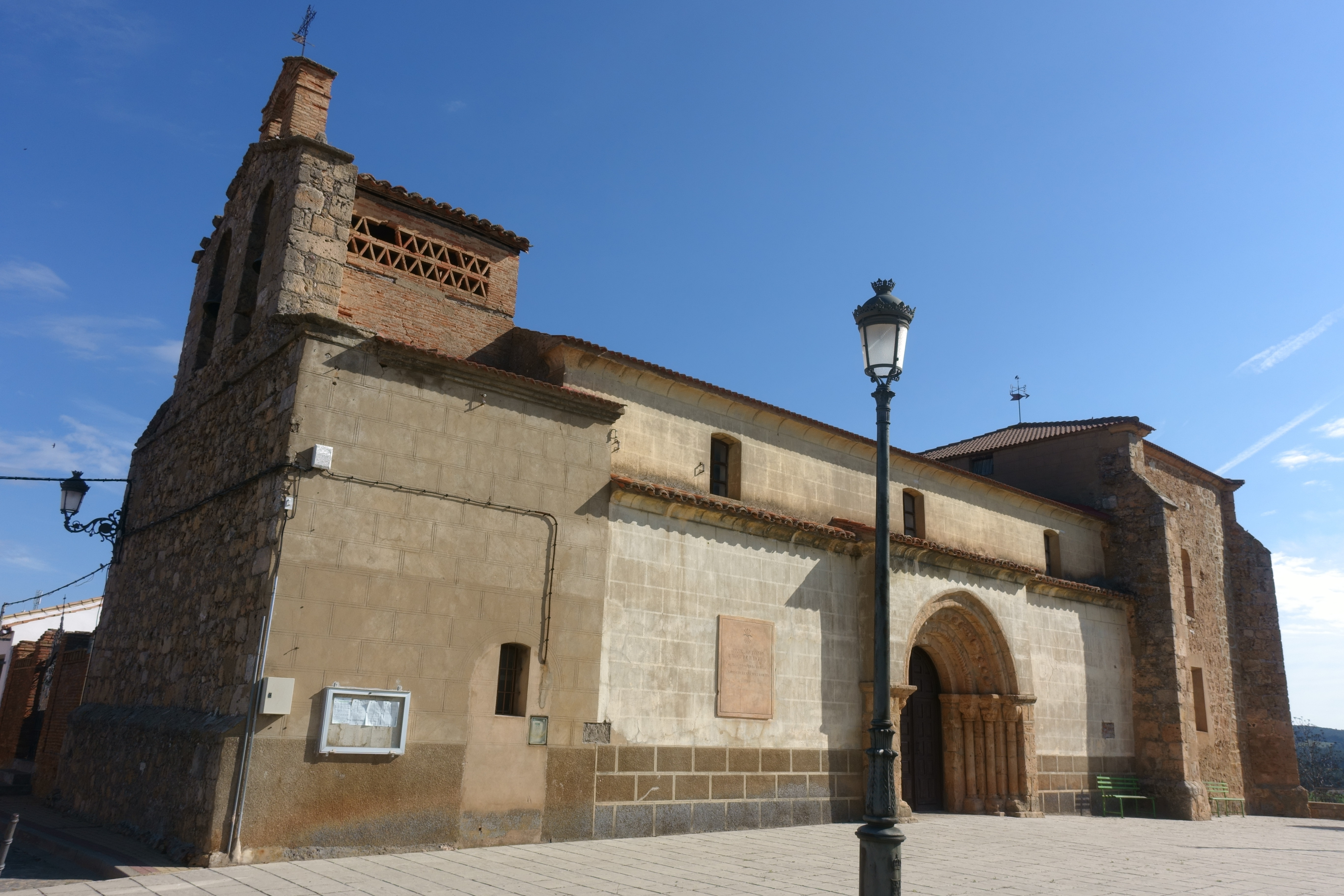 Iglesia de la Inmaculada Concepción, en Matamala de Almazán (Soria, España).